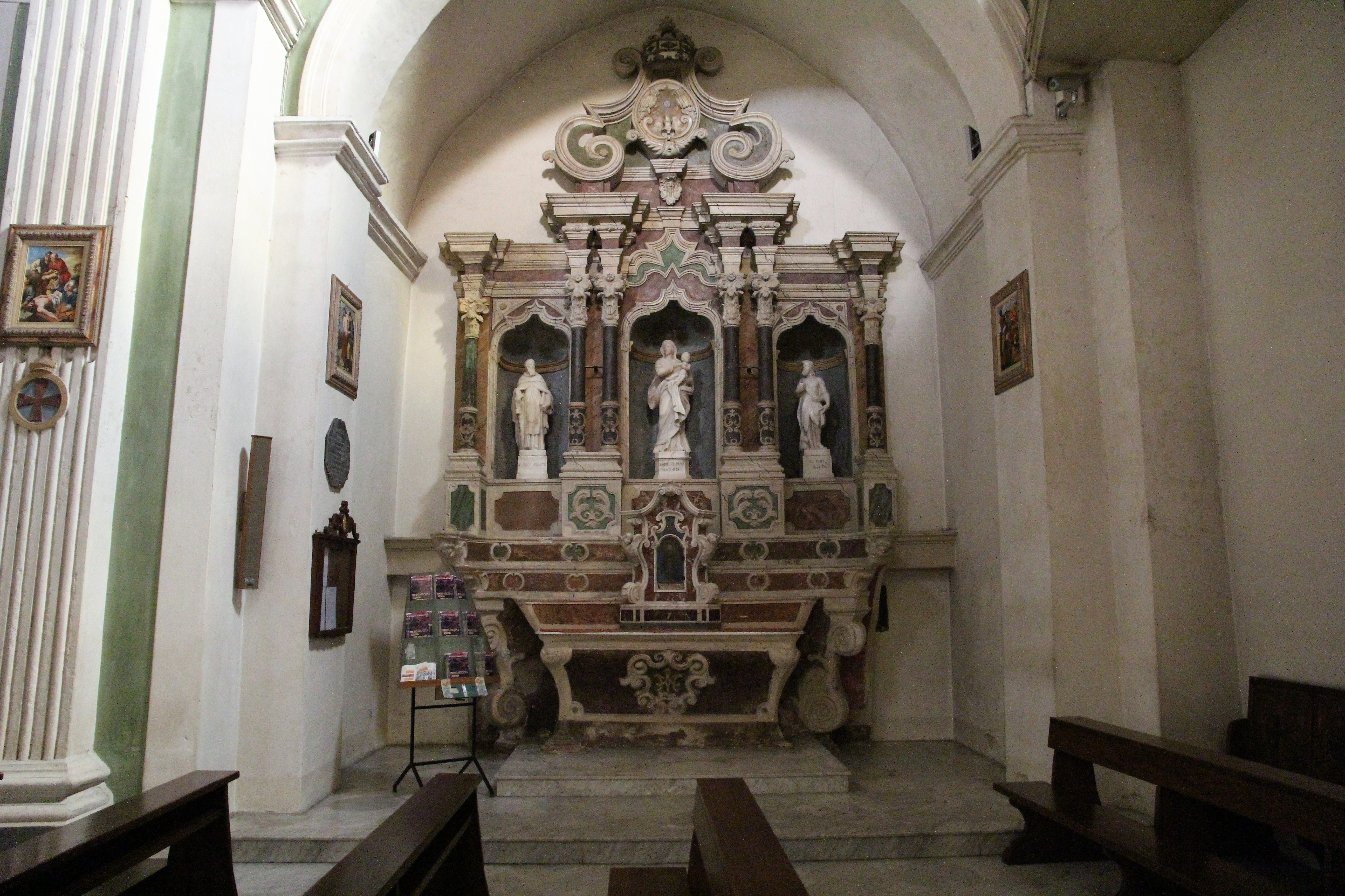 Tempio Pausania, chiesa di San Pietro